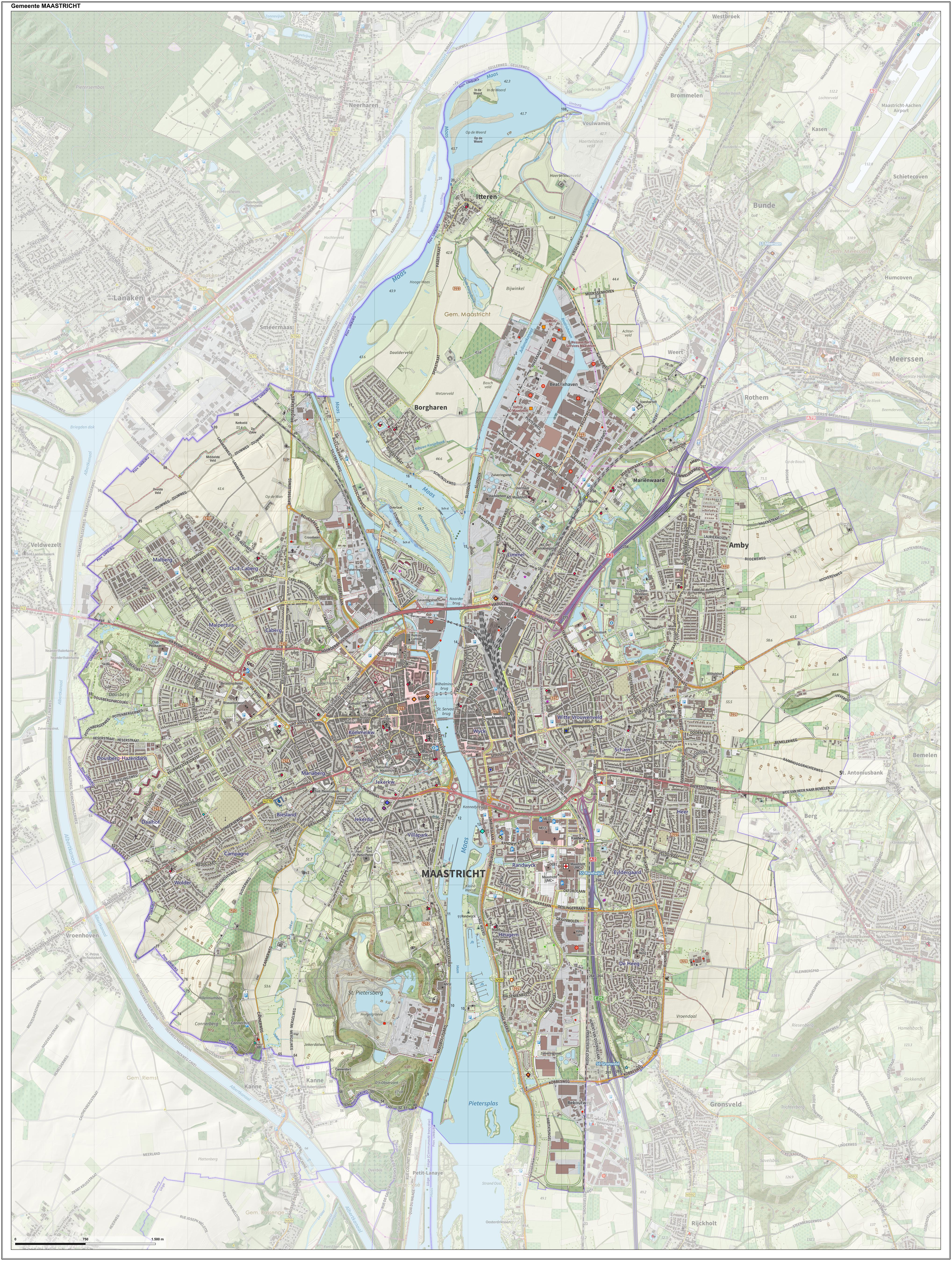 Topografische gemeentekaart. Resolutie: 400 pixels/km. Kaartbeeld samengesteld uit de open geodata van de Top10NL en Top25namen (Kadaster), Creative Commons-BY licentie. Gebouwvlakken uit open geodata BAG extract. Wegen uit de OpenStreetMap, OpenStreetMap community. Reliëfschaduw uit de Actuele Hoogtekaart AHN2. Samenstelling en kleurenschema: Jan-Willem van Aalst, met QGIS. Zie ook de Legenda.